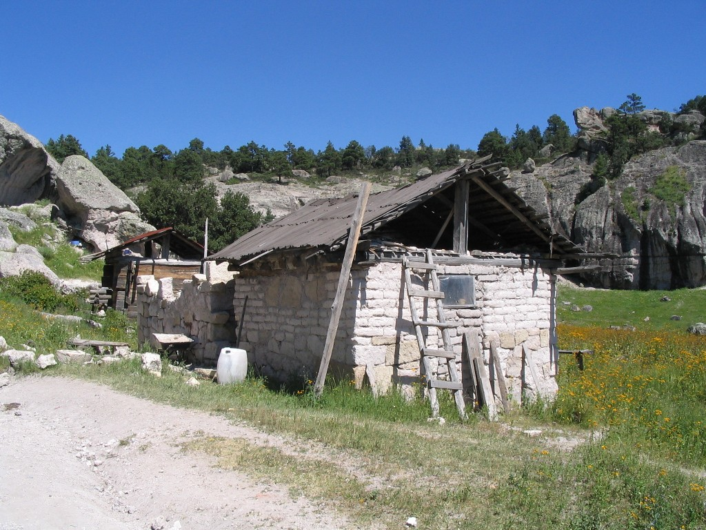 Vivienda típica de los taraumaras en la reserva aborigen en Chihuahua, México.